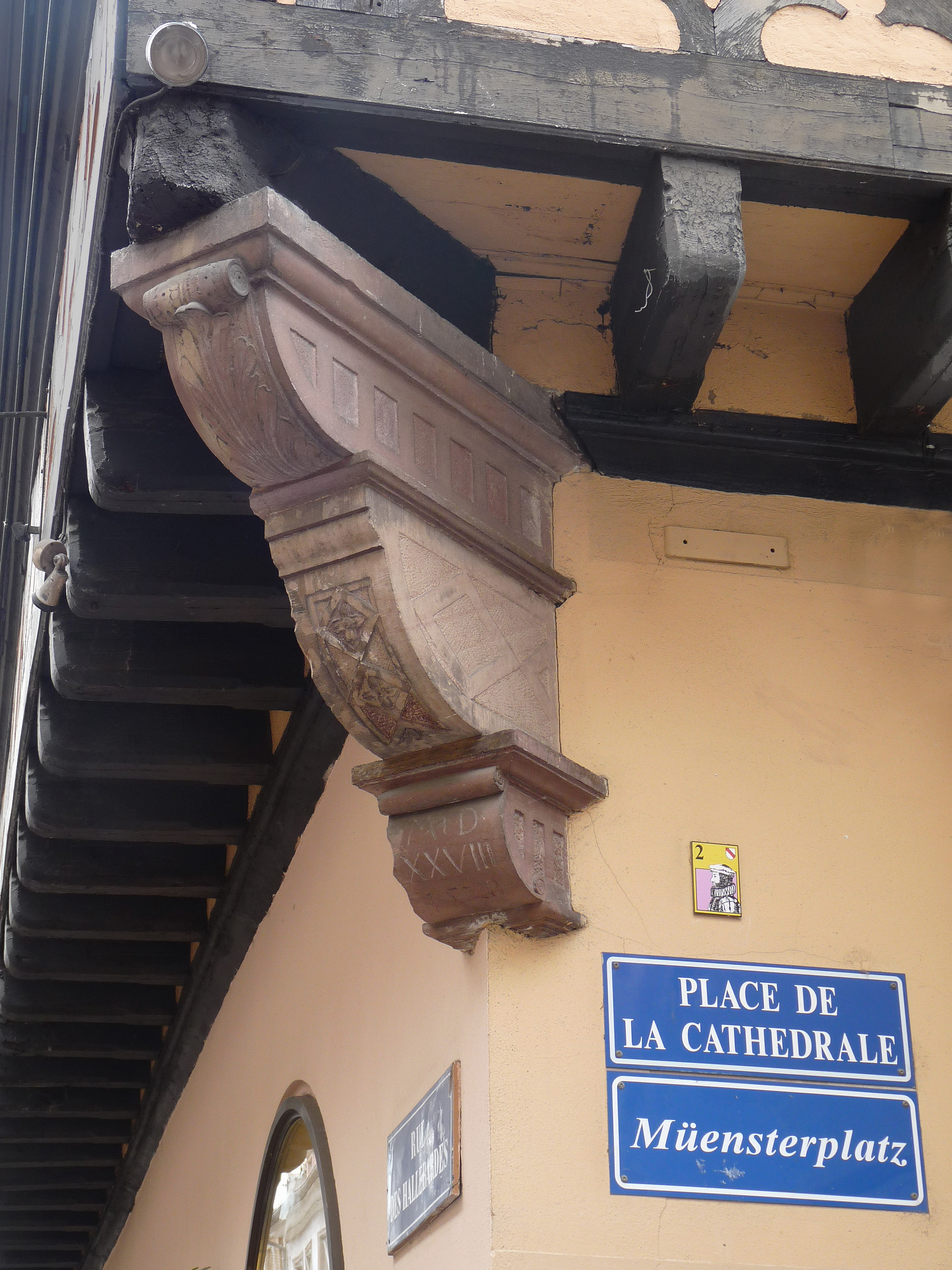 Strasbourg : Maison bourgeoise à colombages à l'angle du 22 de la rue des Hallebardes et du 15, place de la Cathédrale. La console d'angle porte la date 1528. Eléments du Moyen-Age et de la Renaissance inscrits aux Monuments historiques en 1988.